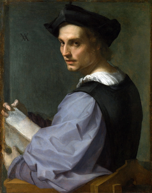 hubo un tiempo en la que se creyó que se trataba de un autorretrato, como puede parecer por la postura del que se sienta para ser retratado. Visari escribió de Andrea. " si su espíritu hubiera sido tan arrojado como profundo era su juicio, hubiera sido inigualable. pero un espíritu tímido y de una naturaleza débil le impidieron exhibir un espíritu ardiente y arrojado, que, junto con sus otras cualidades, le hubieran hecho divino." sin embargo,por muy atractiva que sea esta descripción, no hay fundamentos para aceptarla.